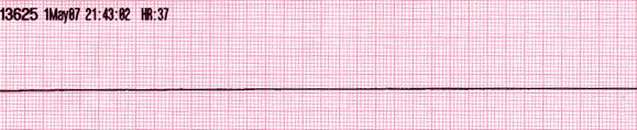 Rhythm Generated